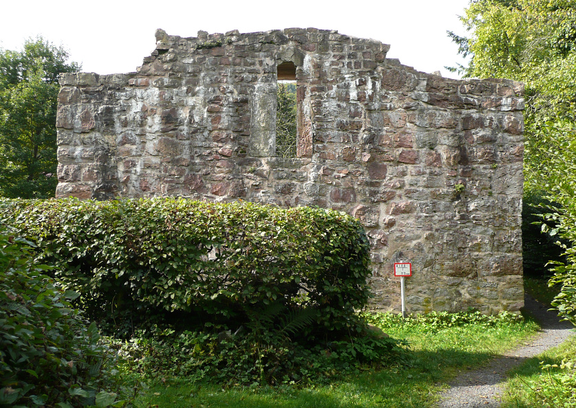 Laurentiuskirchenruine Münden